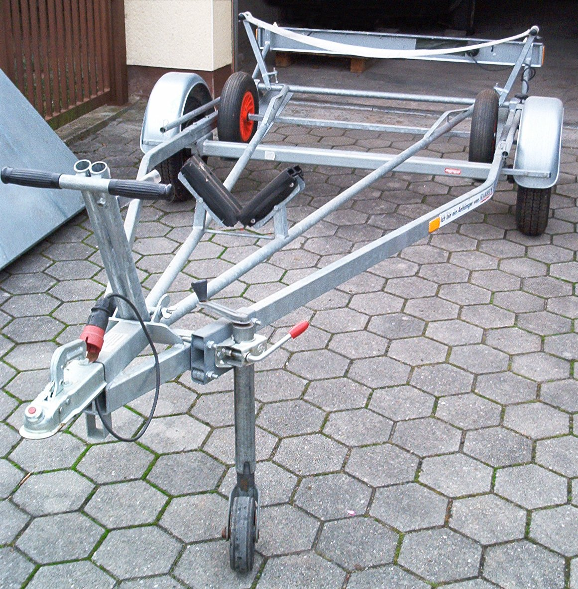 Bootstrailer mit auffahrbarem Slipwagen (Fa. Harbeck Typ 250 S)